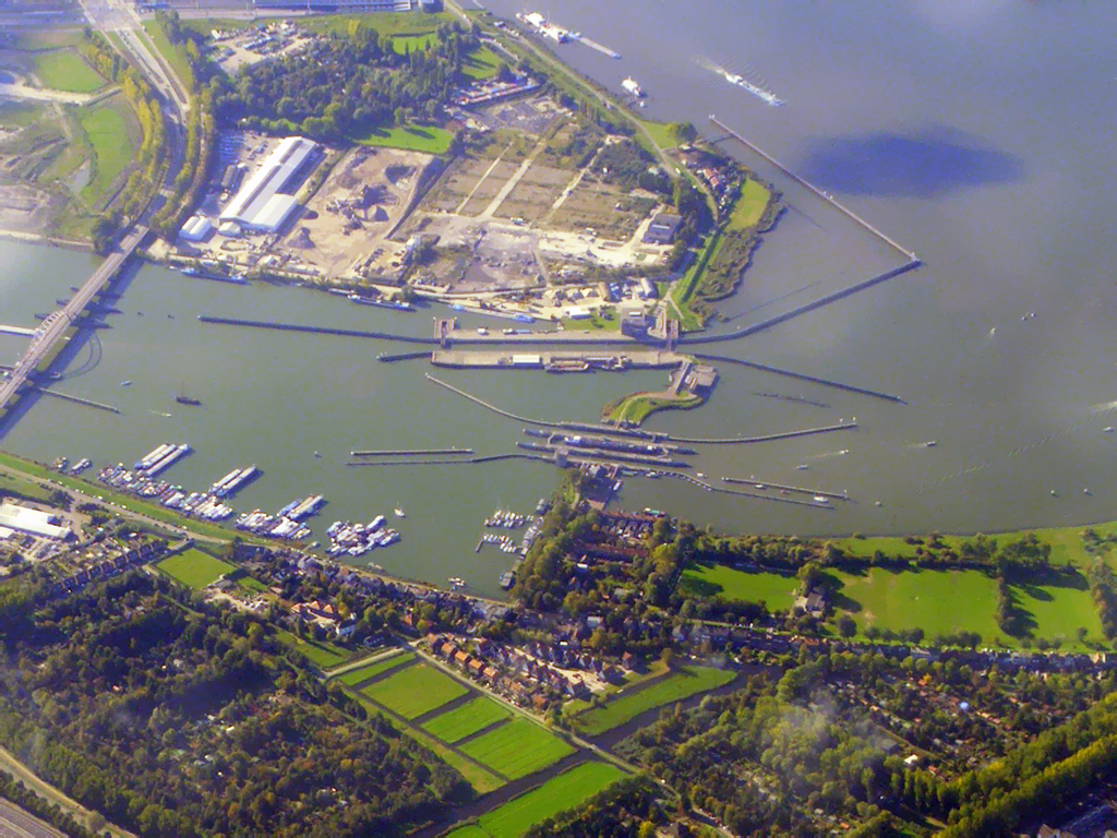 Oranjesluizen, luchtfoto vanuit het noorden. Linksboven: het Zeeburgereiland, onder: Schellingwoude